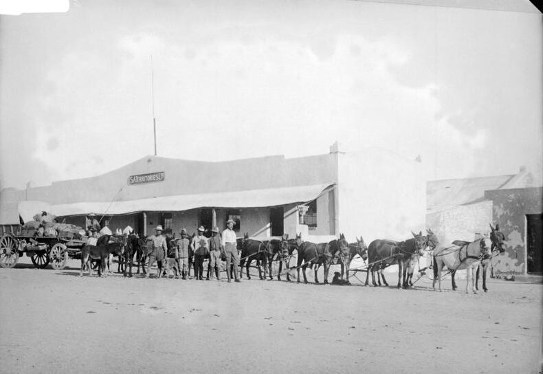 Warmbad, Eselsgespann